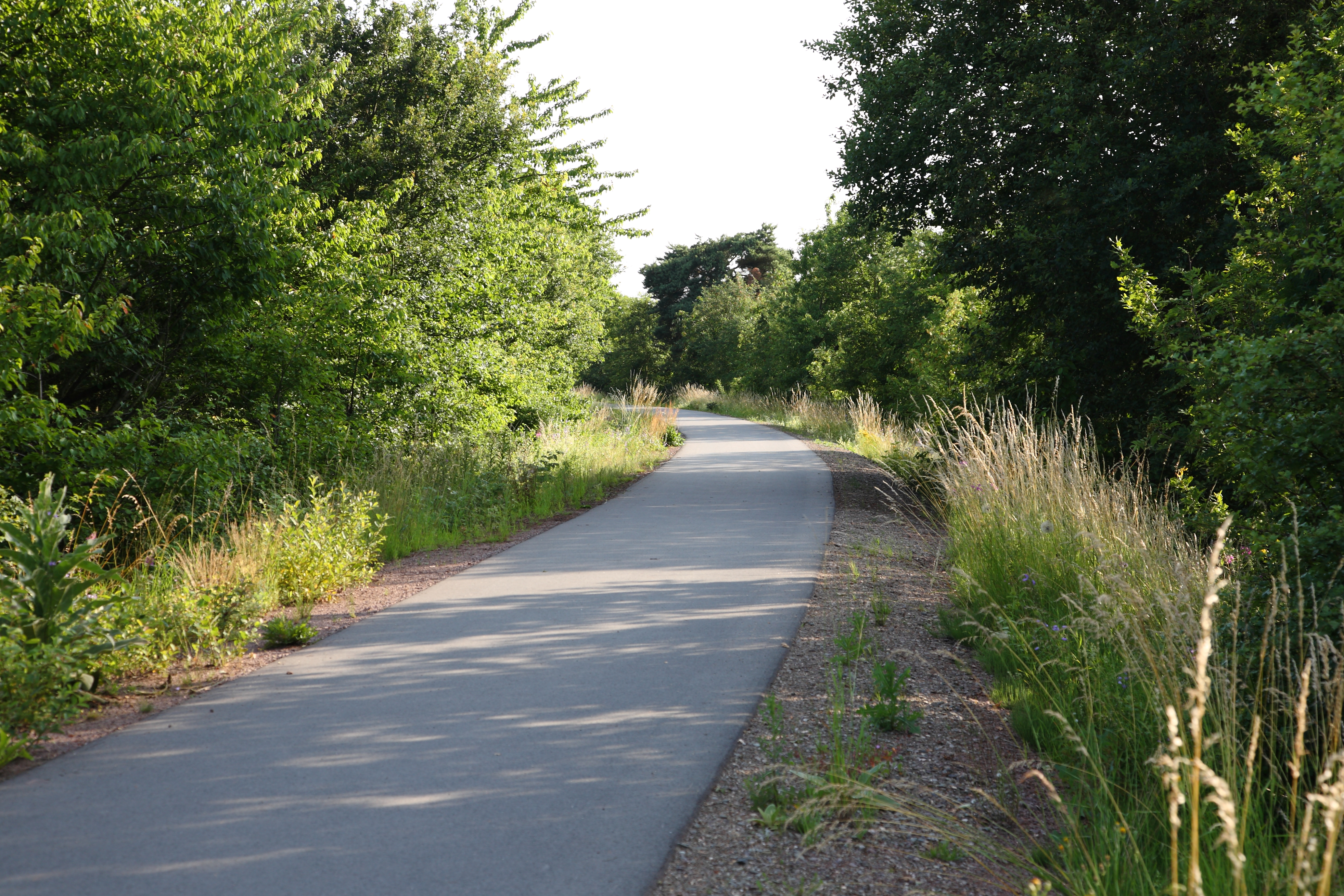 Der ehemaliger Abschnitt der Bahnstrecke Wabern–Brilon Wald (Ederseebahn) in Höringhausen (Stadtteil der Stadt Waldeck), stillgelegt im Jahre 1995. Ab dem Jahr 2008 bis 2012 wurde die "Bahnstrecke Wabern–Brilon Wald" zu einem "Ederseebahn-Radweg" neu gestaltet (umgestaltet).